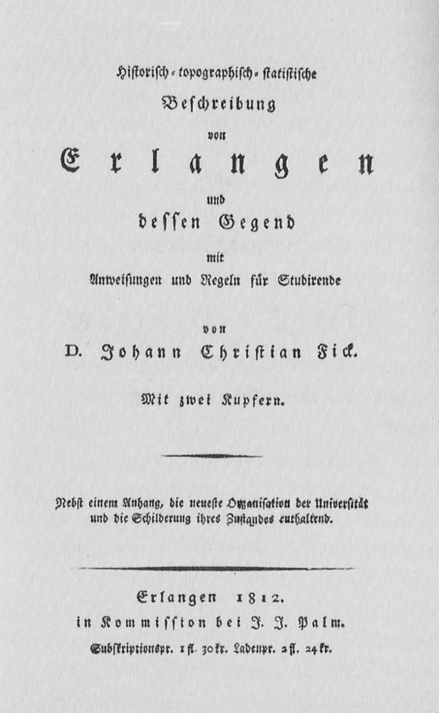 Titel des Stadt- und Universitätsführers Historisch-topographisch-statistische Beschreibung von Erlangen und dessen Gegend mit Anweisungen und Regeln für Studirende von D. Johann Christian Fick. Erlangen 1812.